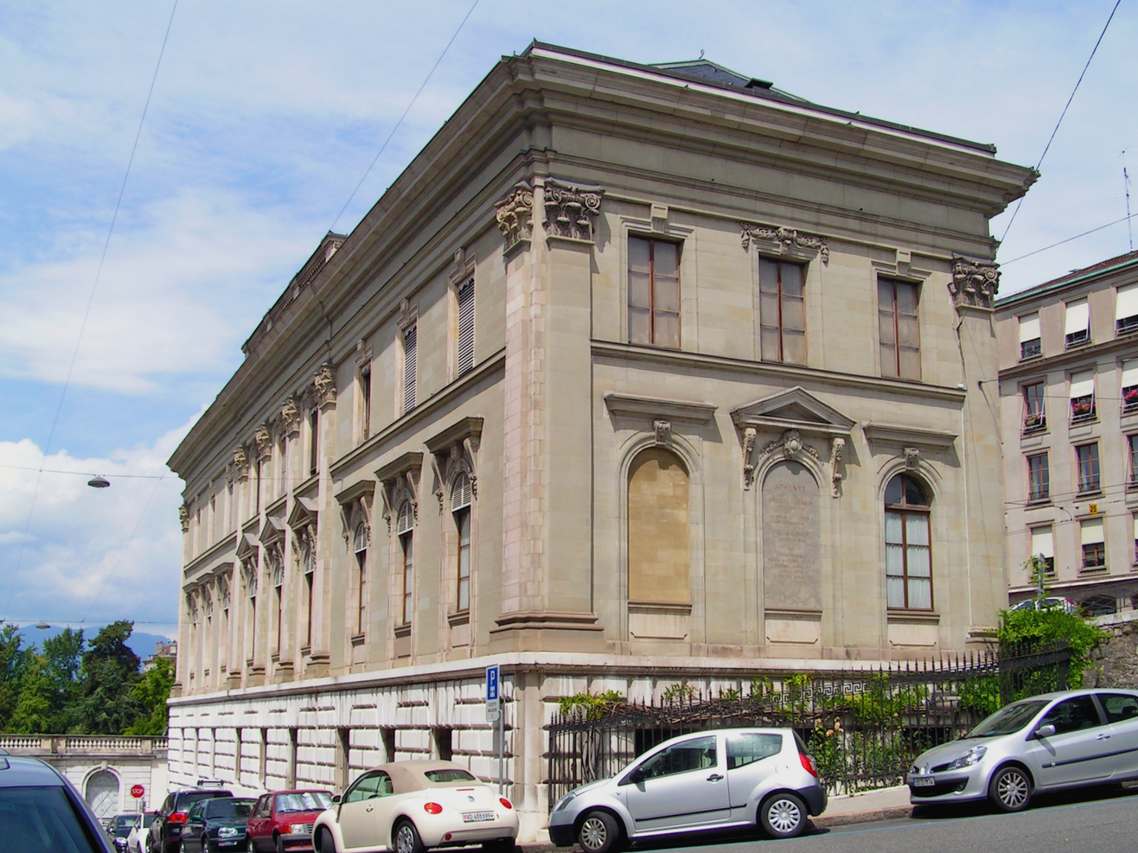 Rue de l'Athénée 2, Genève. Palais de l'Athénée.